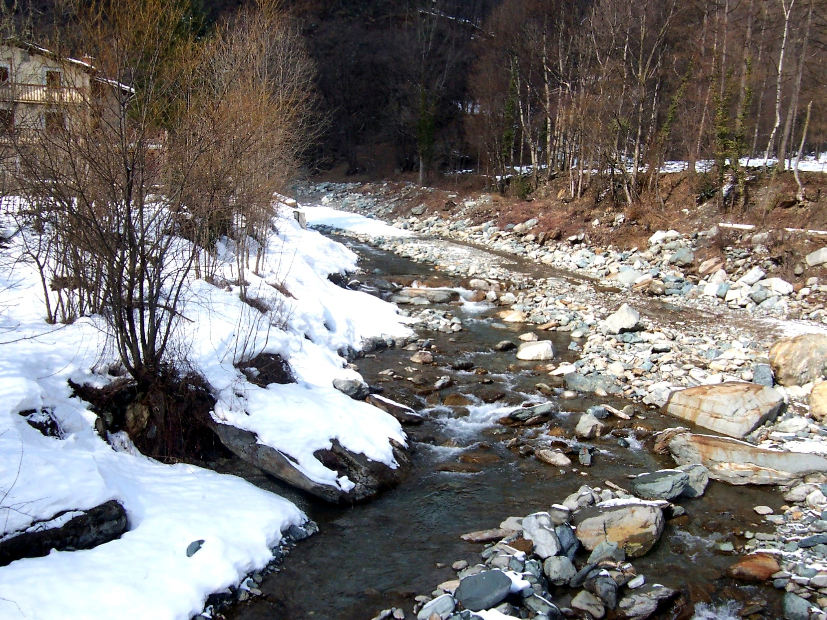 Torrente en los Altes, Italia Torrente de montaña en los alrededores de Torre Pellice. Autor: Alfredobi